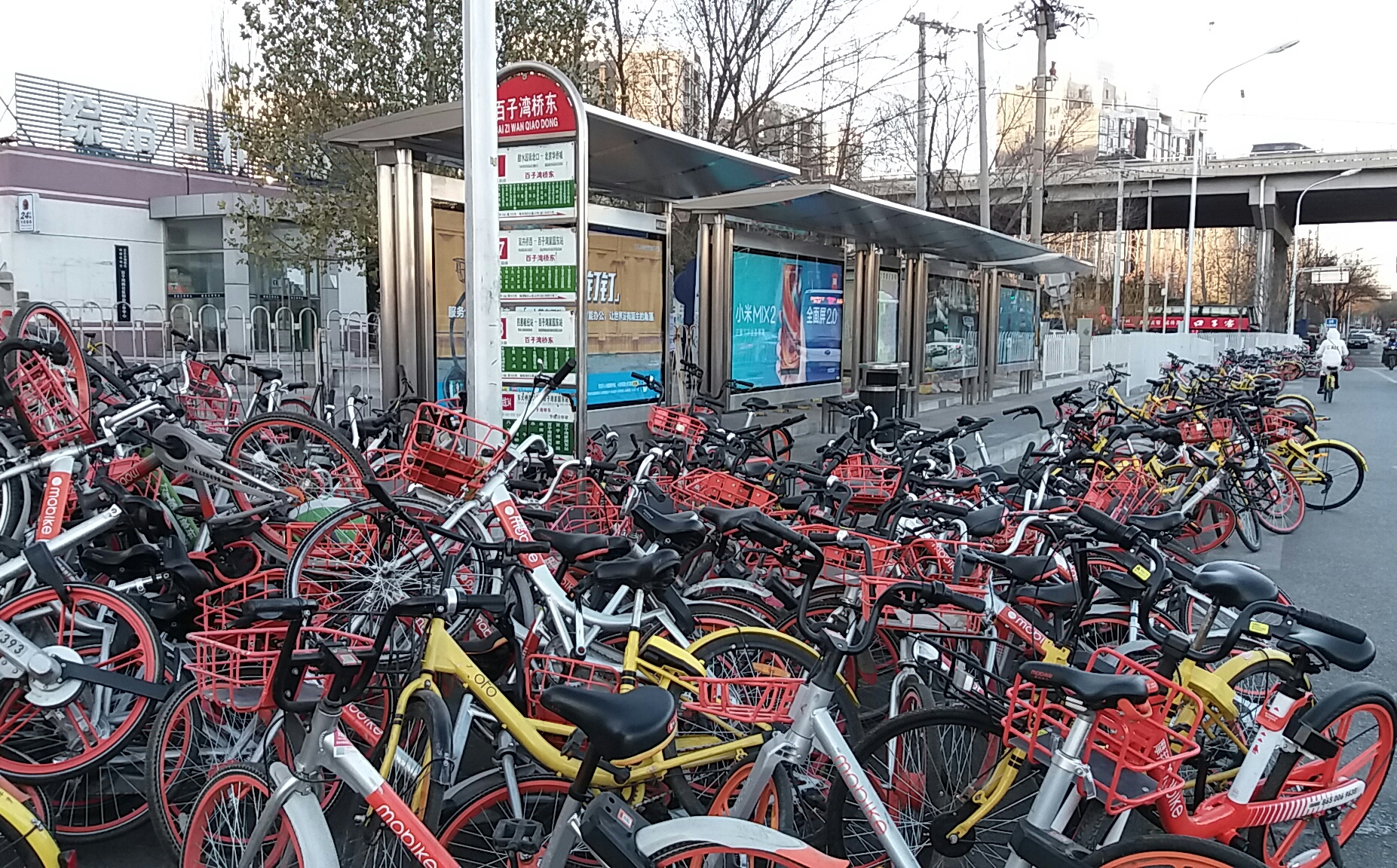 Mobikes in Beijing China